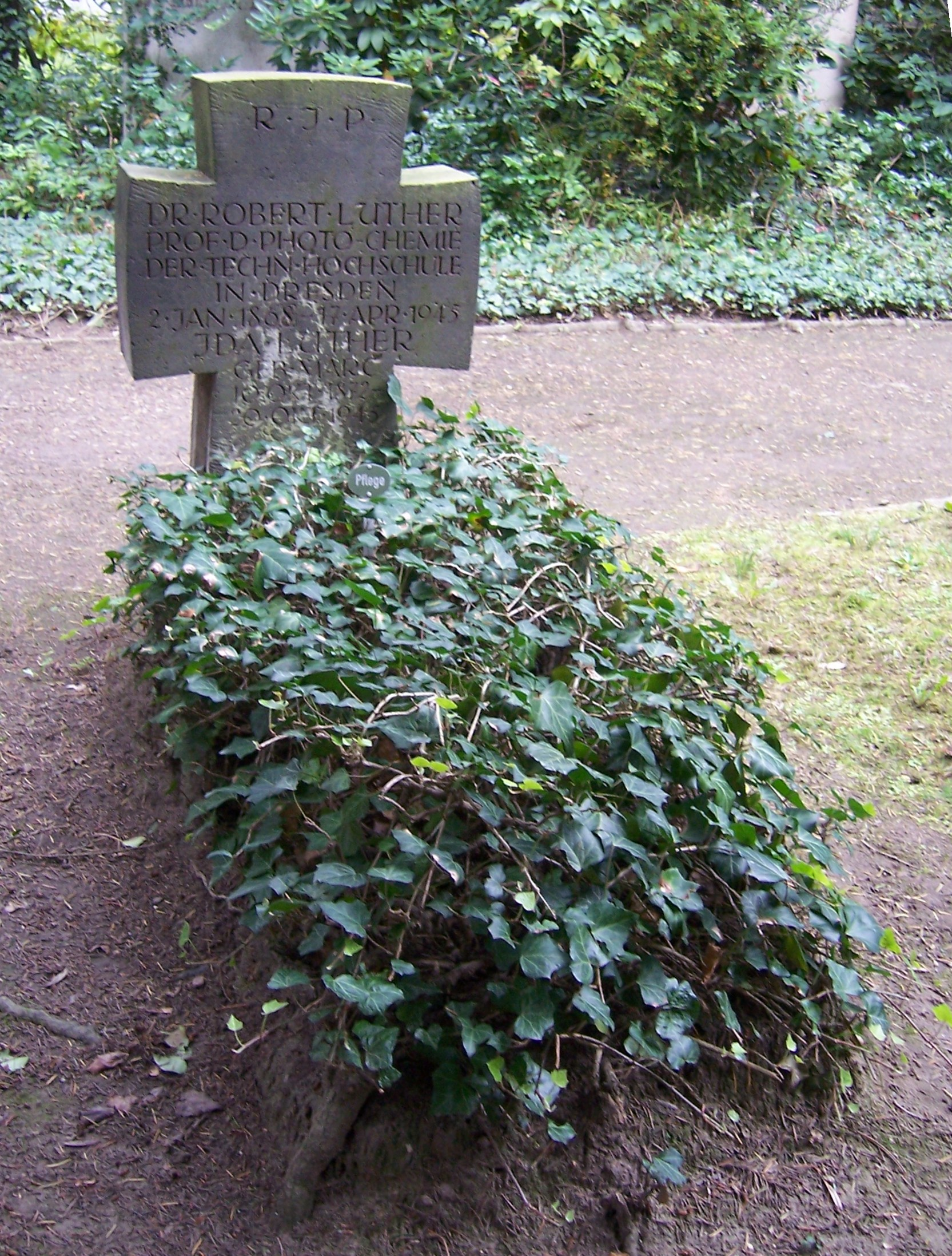 Grab des deutsch-russischen Chemikers Robert Luther auf dem Johannisfriedhof in Dresden.